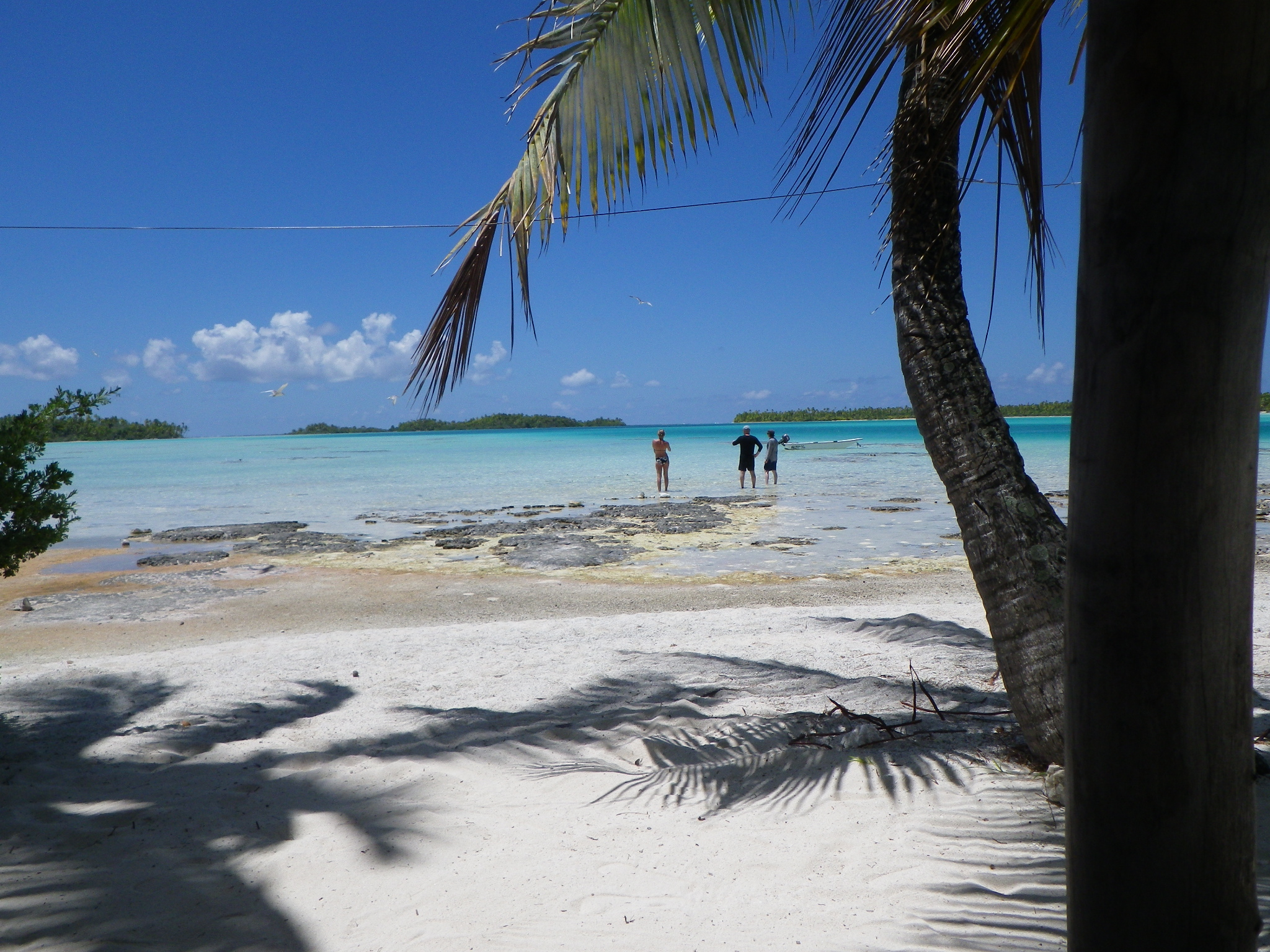 Lagon Bleu - Rangiroa